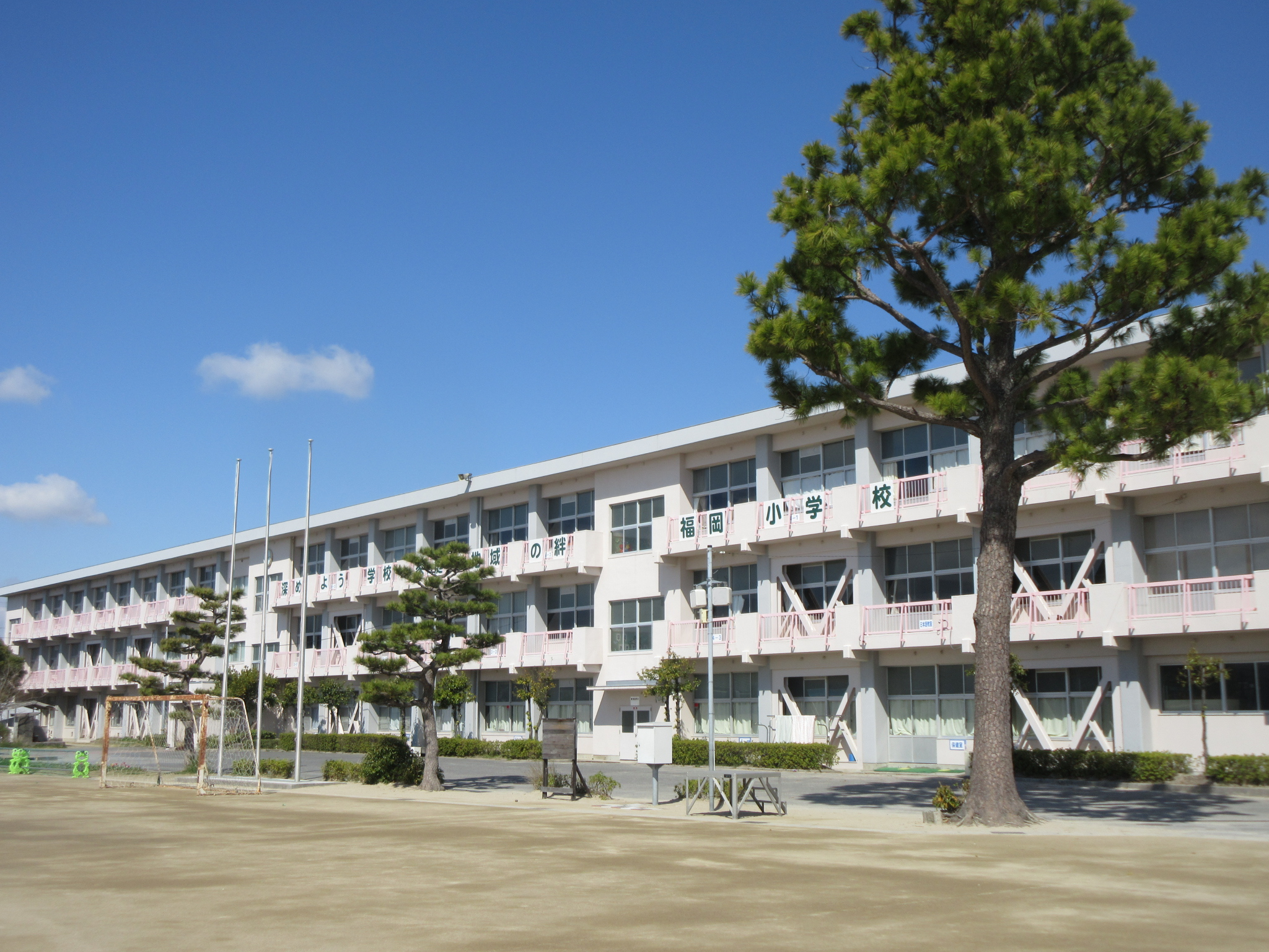 岡崎市立福岡小学校（岡崎市福岡町）